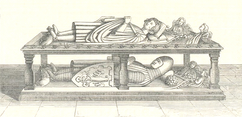 Grabmal der Grafen Heinrich II. und Heinrich III. von Fürstenberg im ehemaligen Kloster Neudingen; s. auch Franz Xaver Kraus (Hrsg.): Die Kunstdenkmäler des Grossherzogthums Baden. Beschreibende Statistik / im Auftrage des Grossherzoglichen Ministeriums der Justiz, des Kultus und Unterrichts und in Verbindung mit Josef Durm, Ernst Wagner, Band 2: Kreis Villingen. Freiburg i. B. 1890, S. 42 online bei der UB Heidelberg